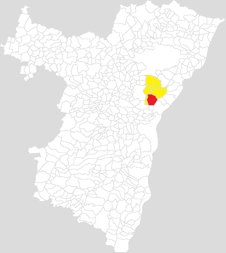 Communauté de communes de la Basse Zorn